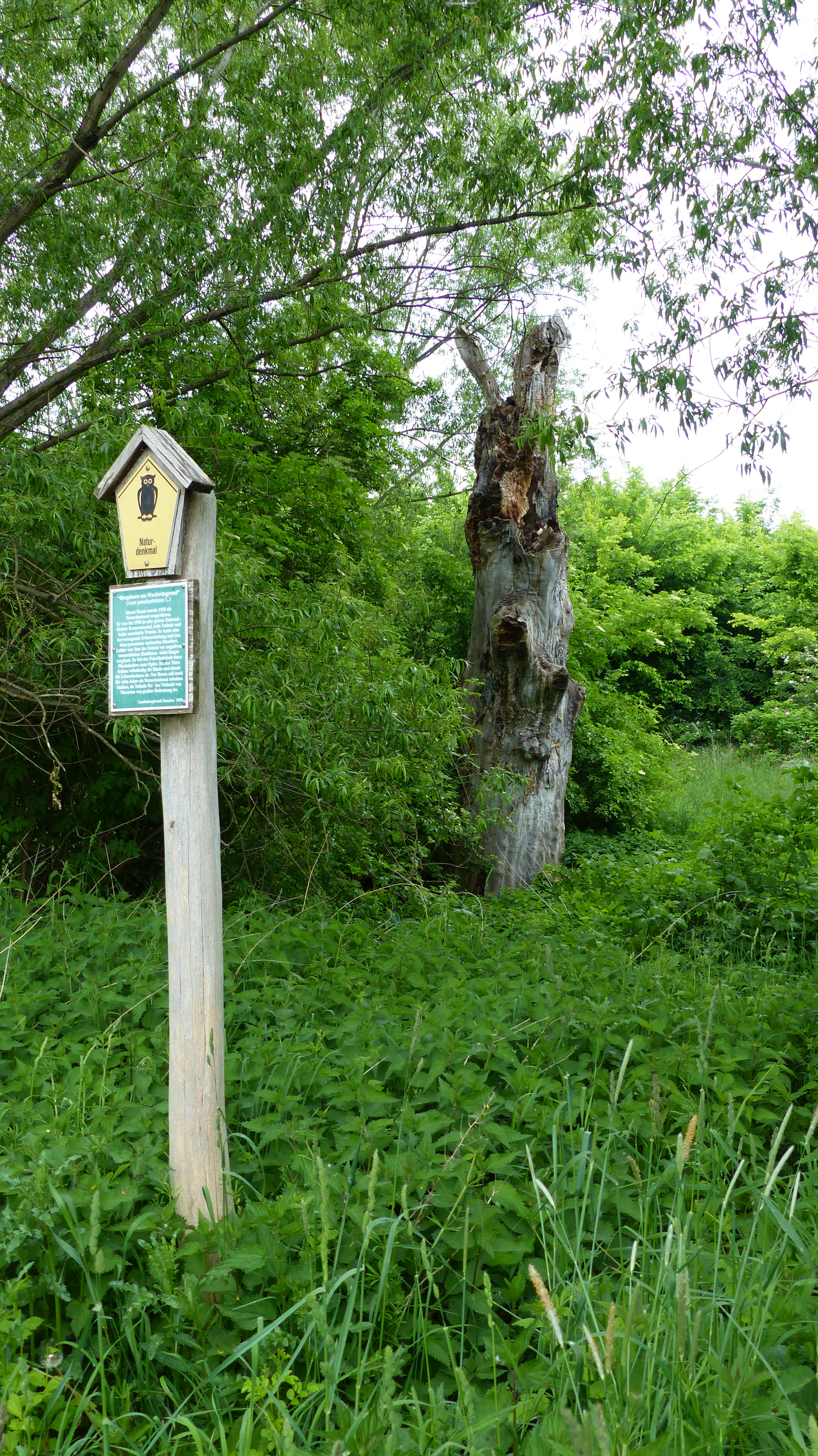 Naturdenkmal Bergahorn am Wachwitzgrund, Gönnsdorf, Dresden